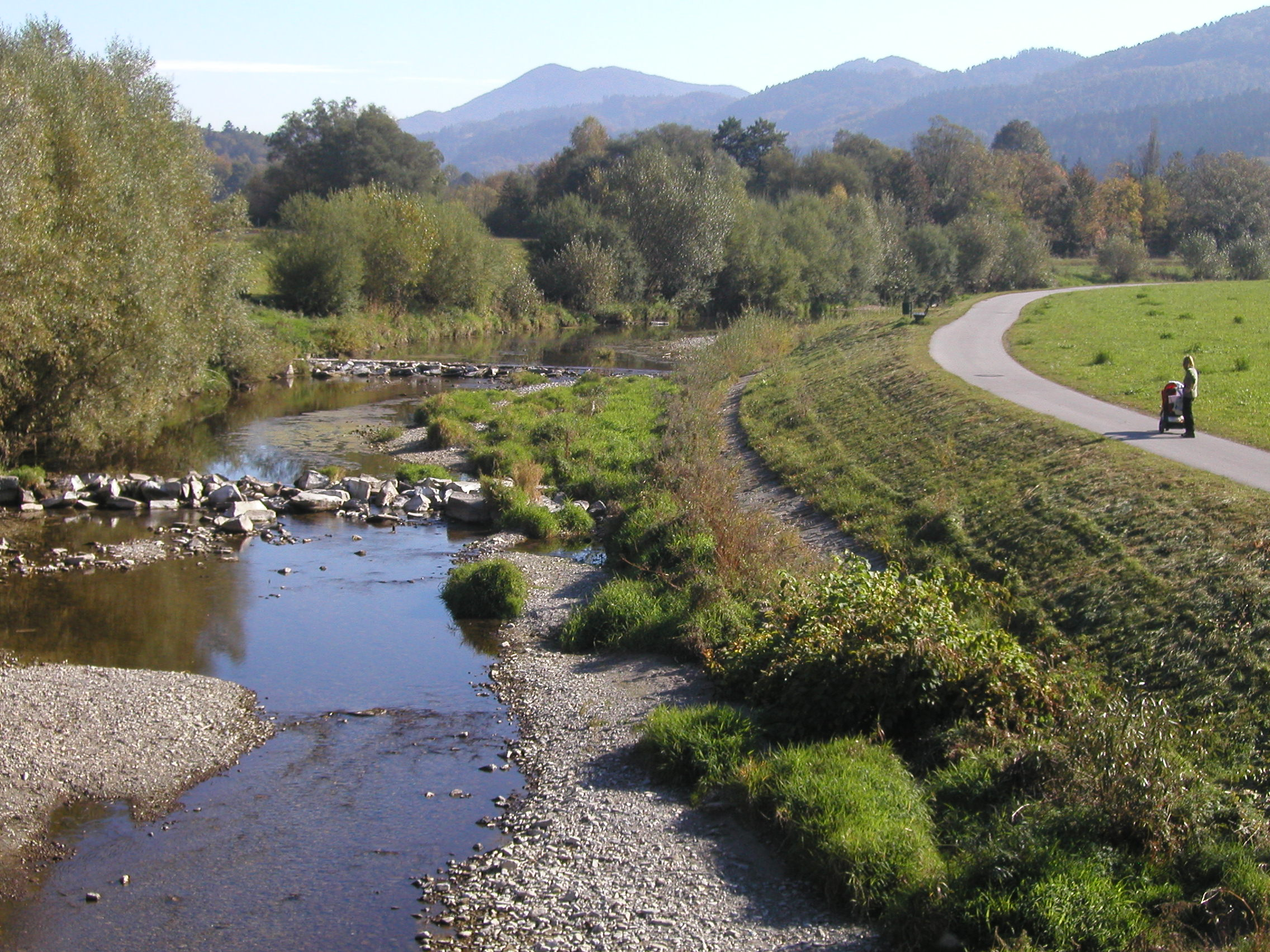 Fluss Gölsen, Gölsen (Hainfeld), Niederösterreich. – Alternativtext: „Gölsen bei Wiesenfeld, St. Veit an der Gölsen.“